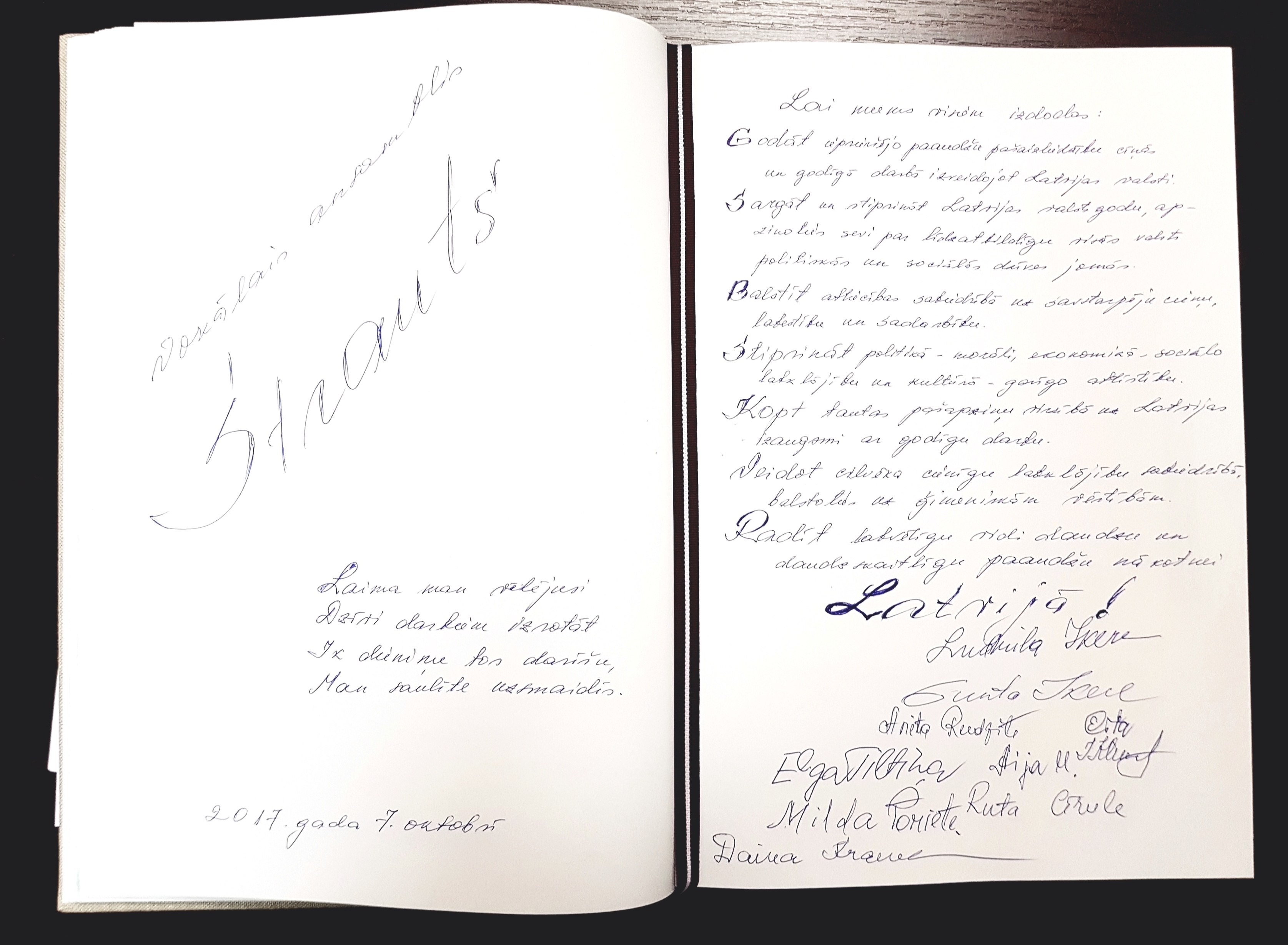 Ieraksti TSG